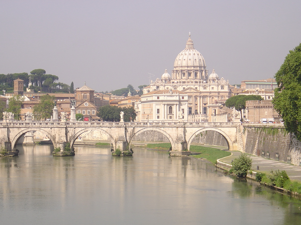 Rome, le Pont Saint-Ange et la Basilique Saint-Pierre du Vatican